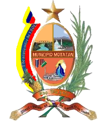 Escudo del municipio Motatán, estado Trujillo, Venezuela